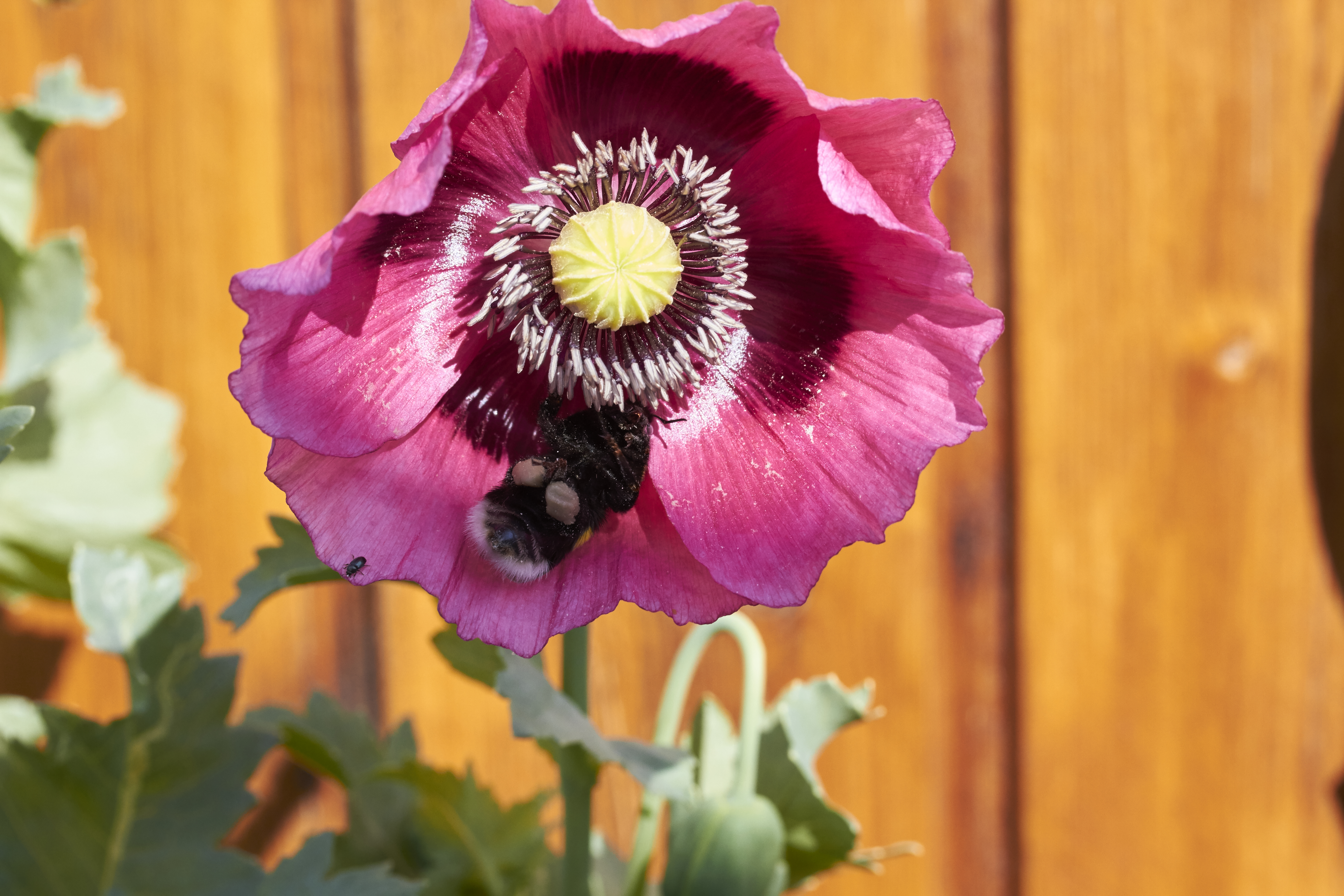 Bombus an einer Zuchtform der Mohnblume mit gut sichtbaren Pollenpaketen an den Beinen